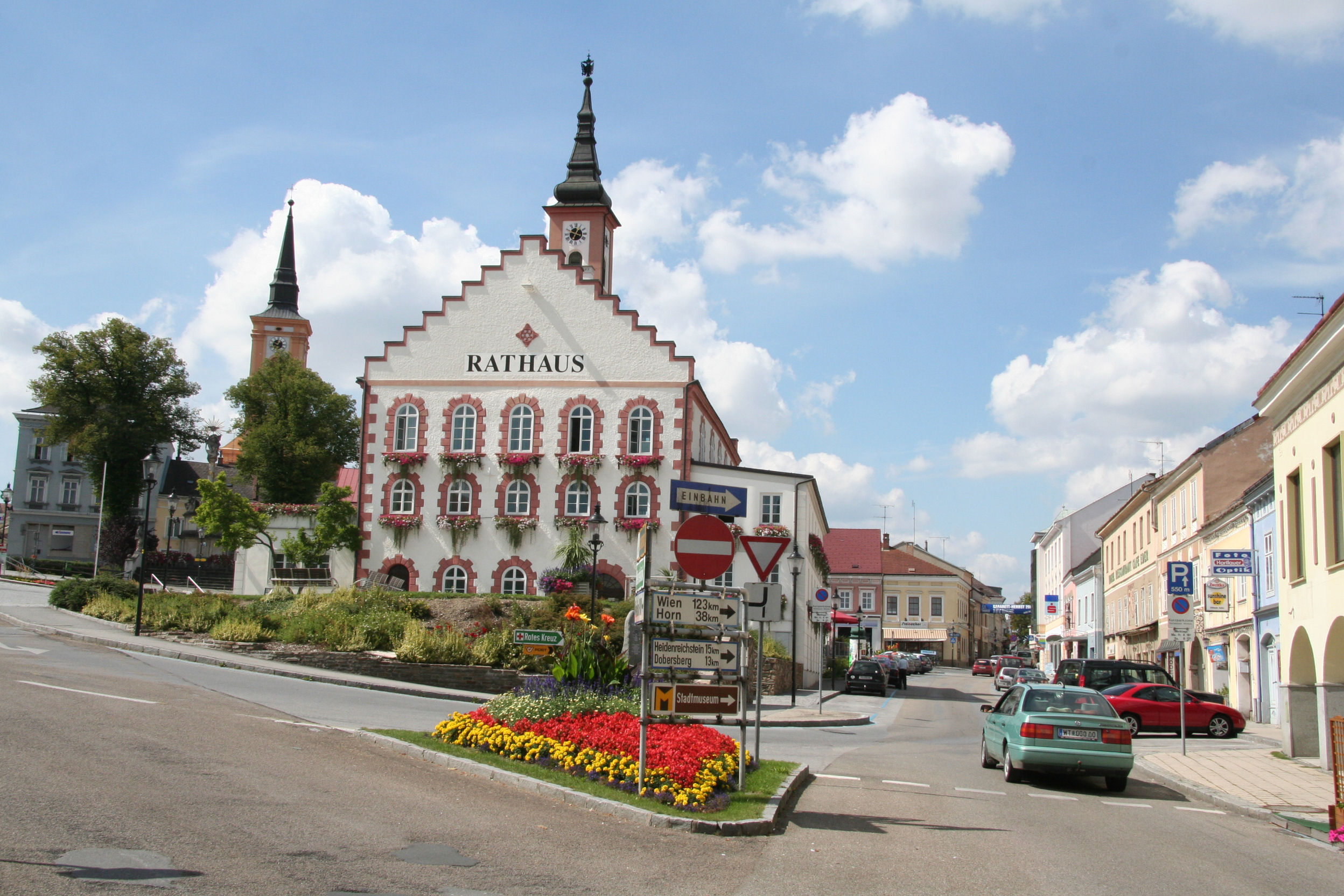 Waidhofen an der Thaya Rathaus